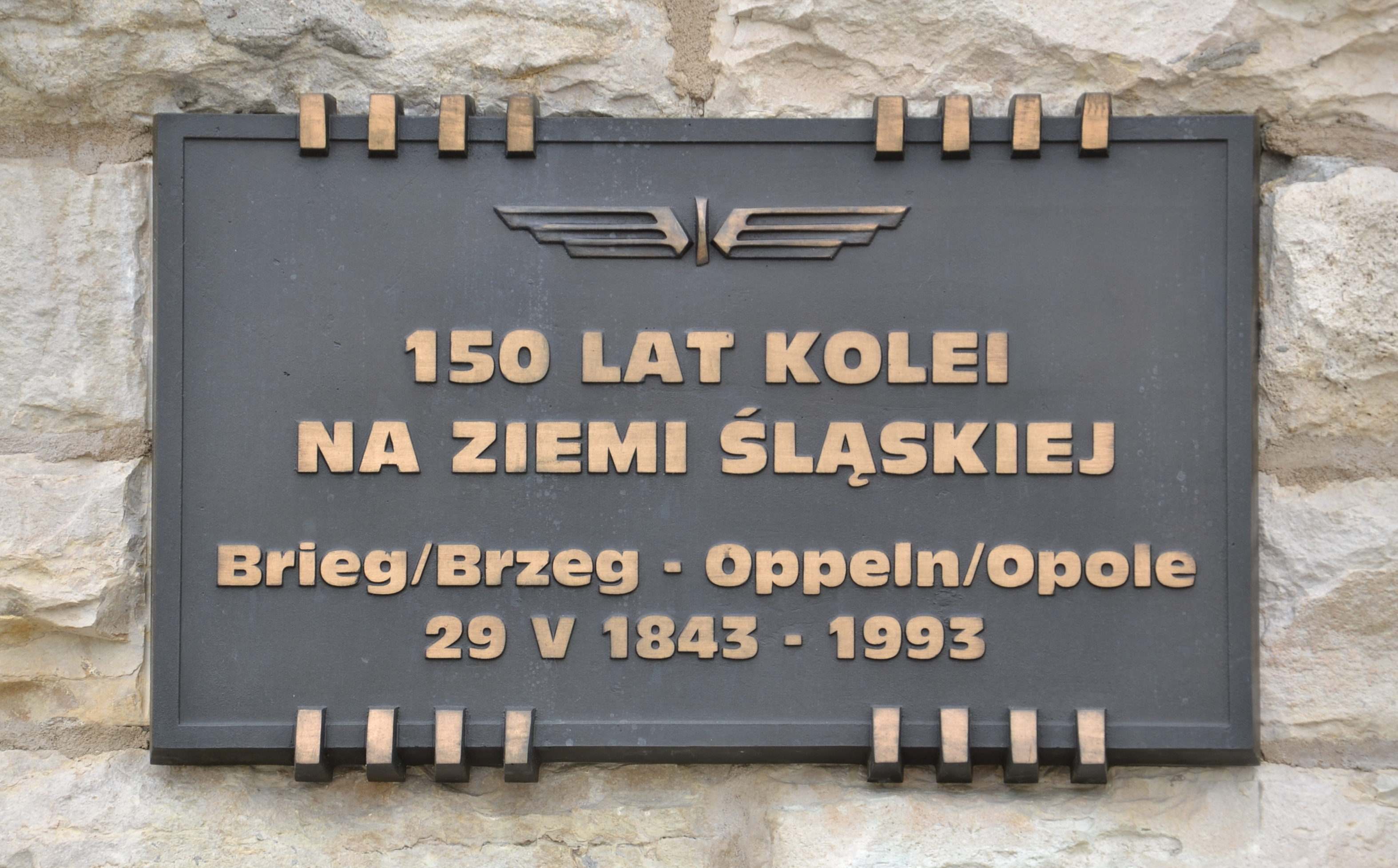 Tablica na Dworcu Głównym w Opolu. Całkowicie błędna, bo pierwszą koleją na ziemiach śląskich był otwarty odcinek w 1842 roku Wrocław-Oława